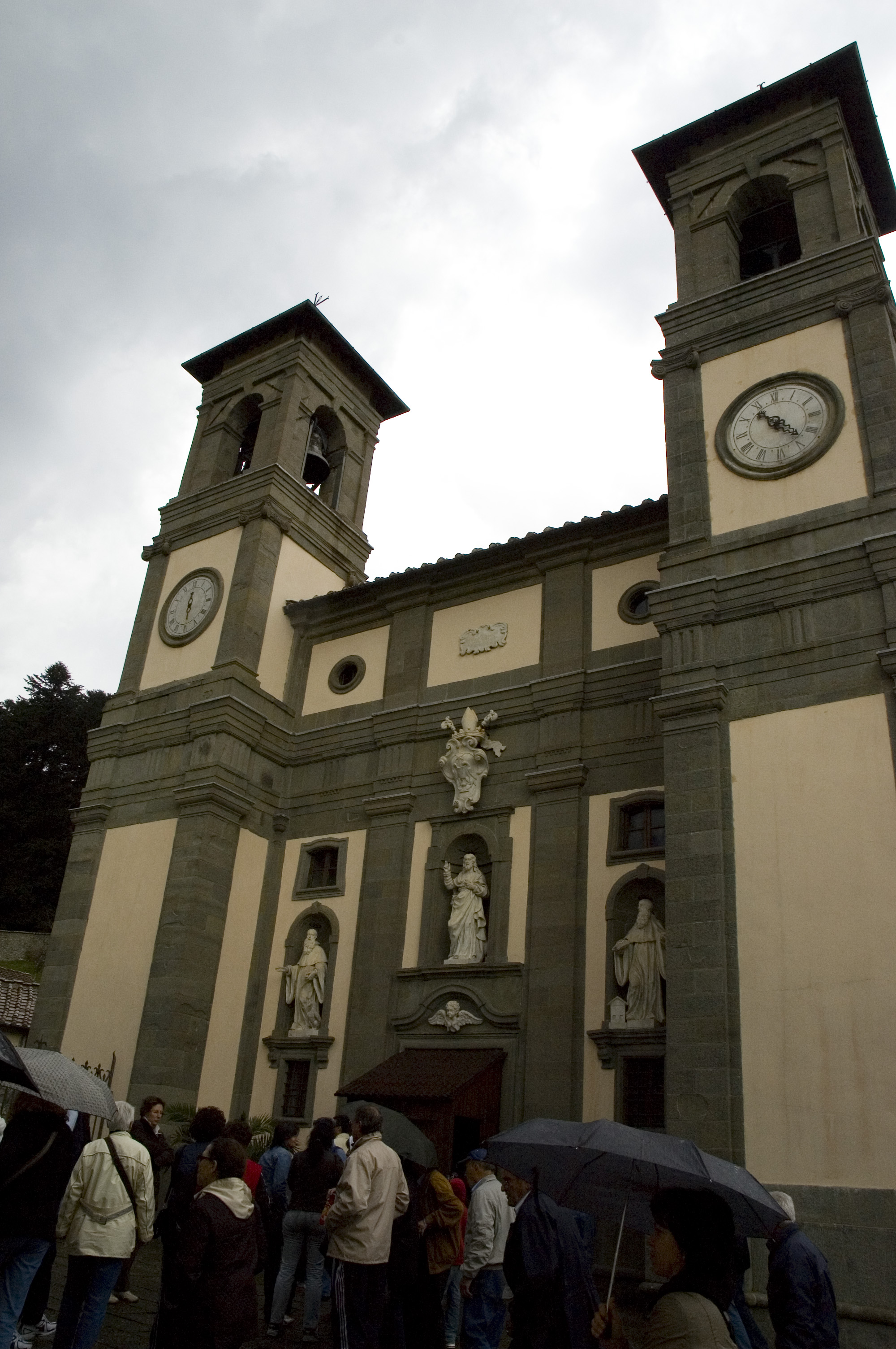 Eremo di Camaldoli